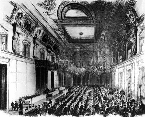 Eröffnung des preußischen Vereinigten Landtages (1849)